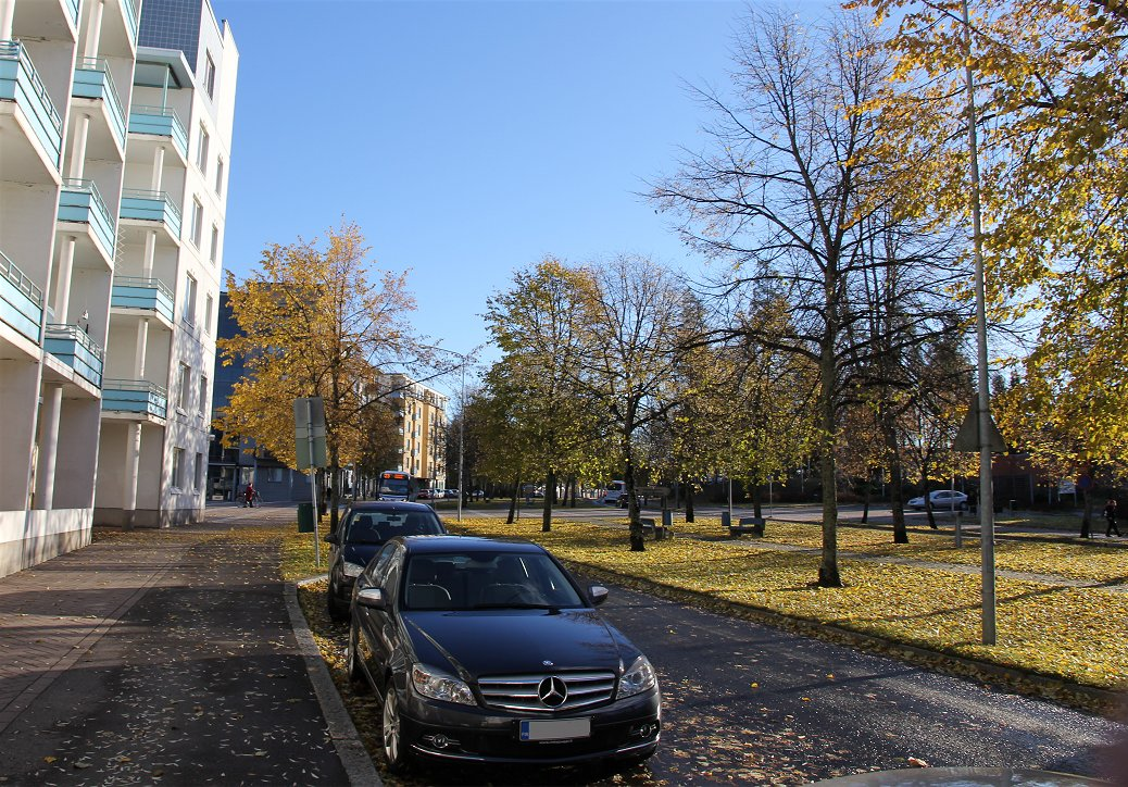 Kuopion Petosen (kaupunginosajaottelun mukaan Litmasen kaupunginosan) keskustaa: Pyörönkaarta vuonna 1982 valmistuneen Vapauden aukion seudulla.